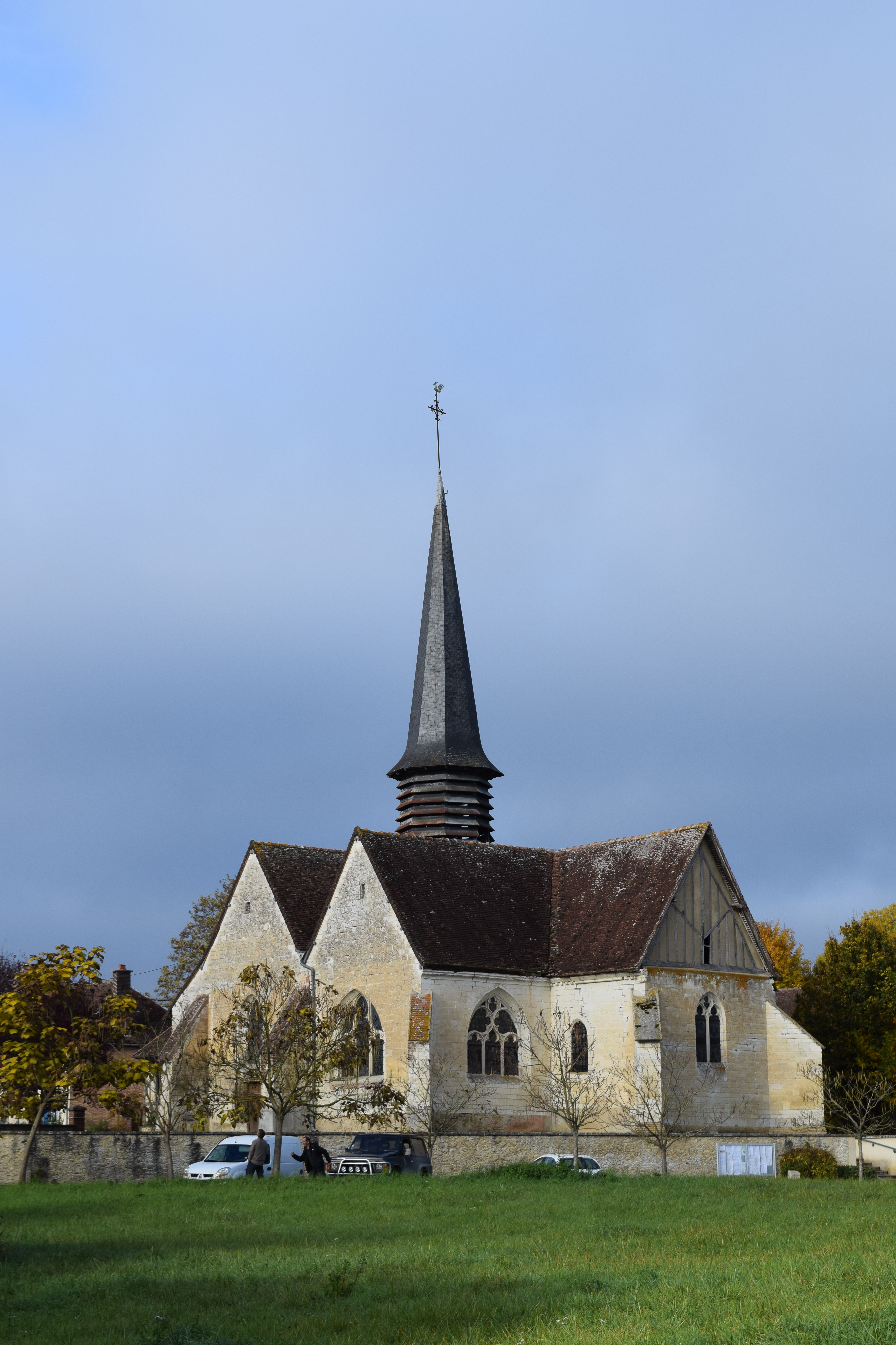 Église Saint Donat de Rouilly-Saint-Loup, vue d'ensemble.